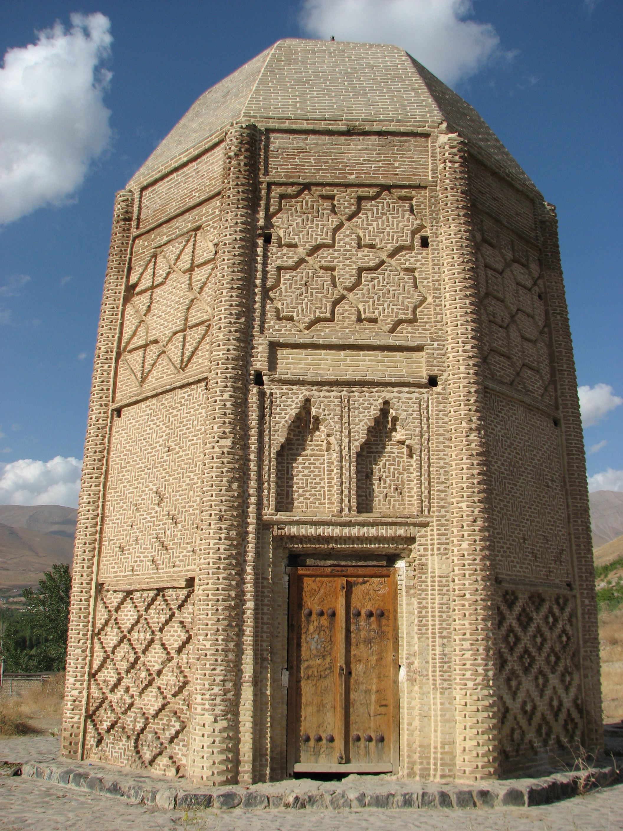 برج شیخ شبلی